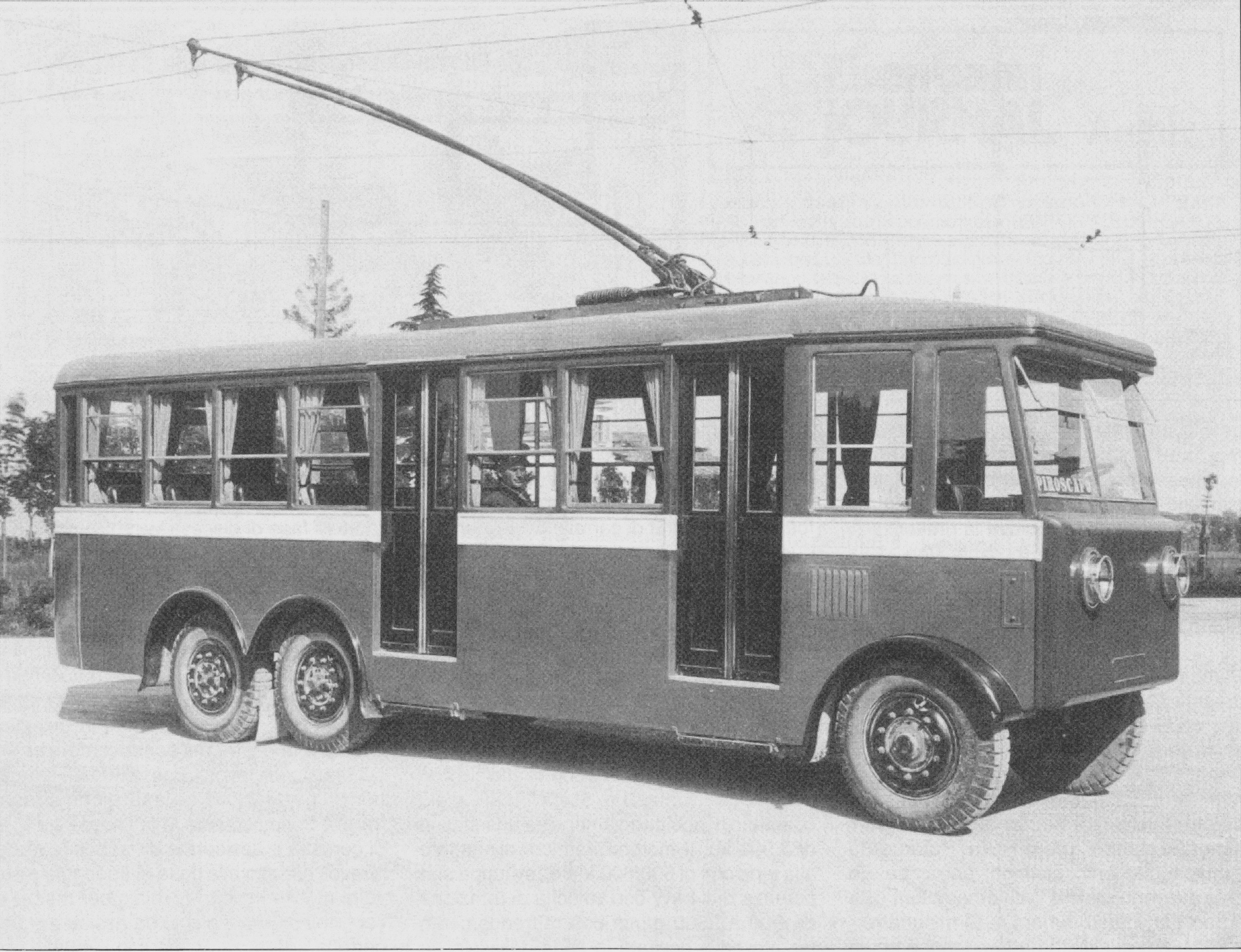 Il Filobus FEDRA nr. 2 in sosta presso il piazzale antistante la stazione ferroviaria di Desenzano.